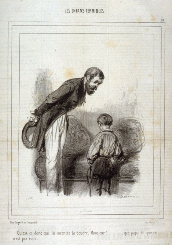 Paul Guillaume Sulpice Gavarni (1801-1866). Les Enfants Terribles: "Qu'est-ce donc qui l’a inventée la poudre, monsieur?....que papa dit que ce n’est pas vous.."; no. 10 from the series "Les Enfants Terribles"